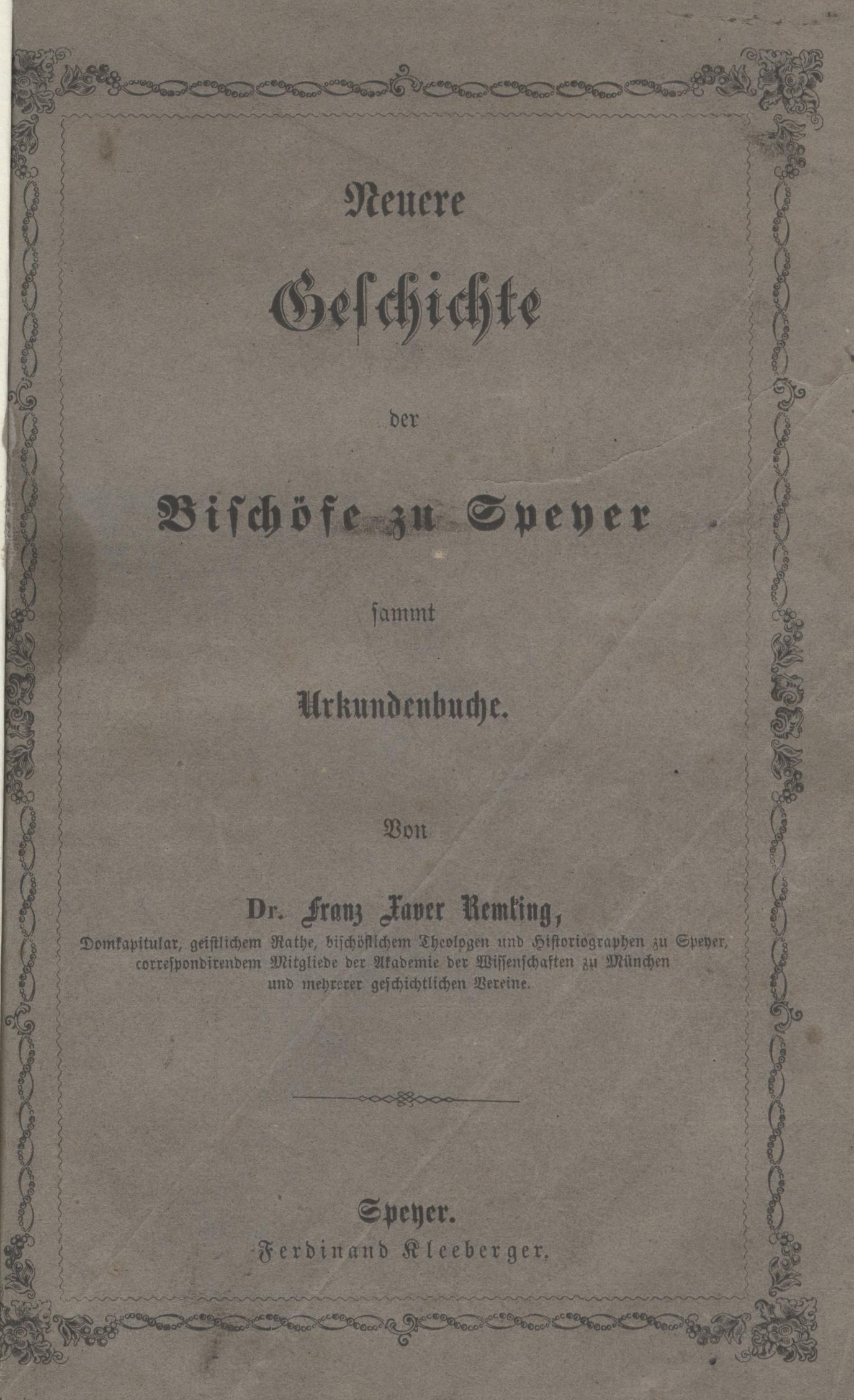 Domkapitular Franz Xaver Remling, Speyer, Bucheinband